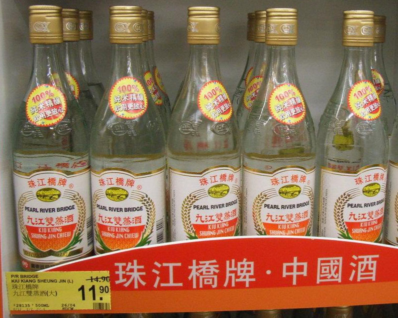 廣東省九江酒廠有限公司出品九江雙蒸酒